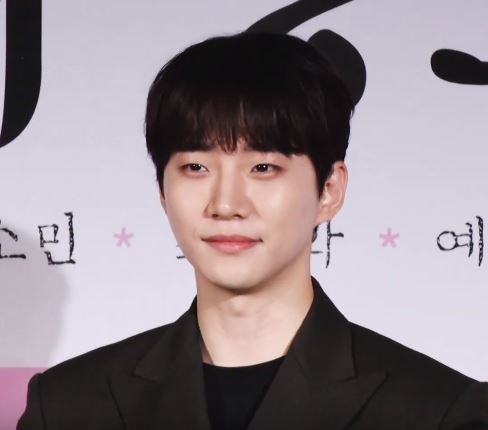 14일 오전 서울 중구 메가박스 동대문에서 열린 영화 '기방도령' 제작보고회